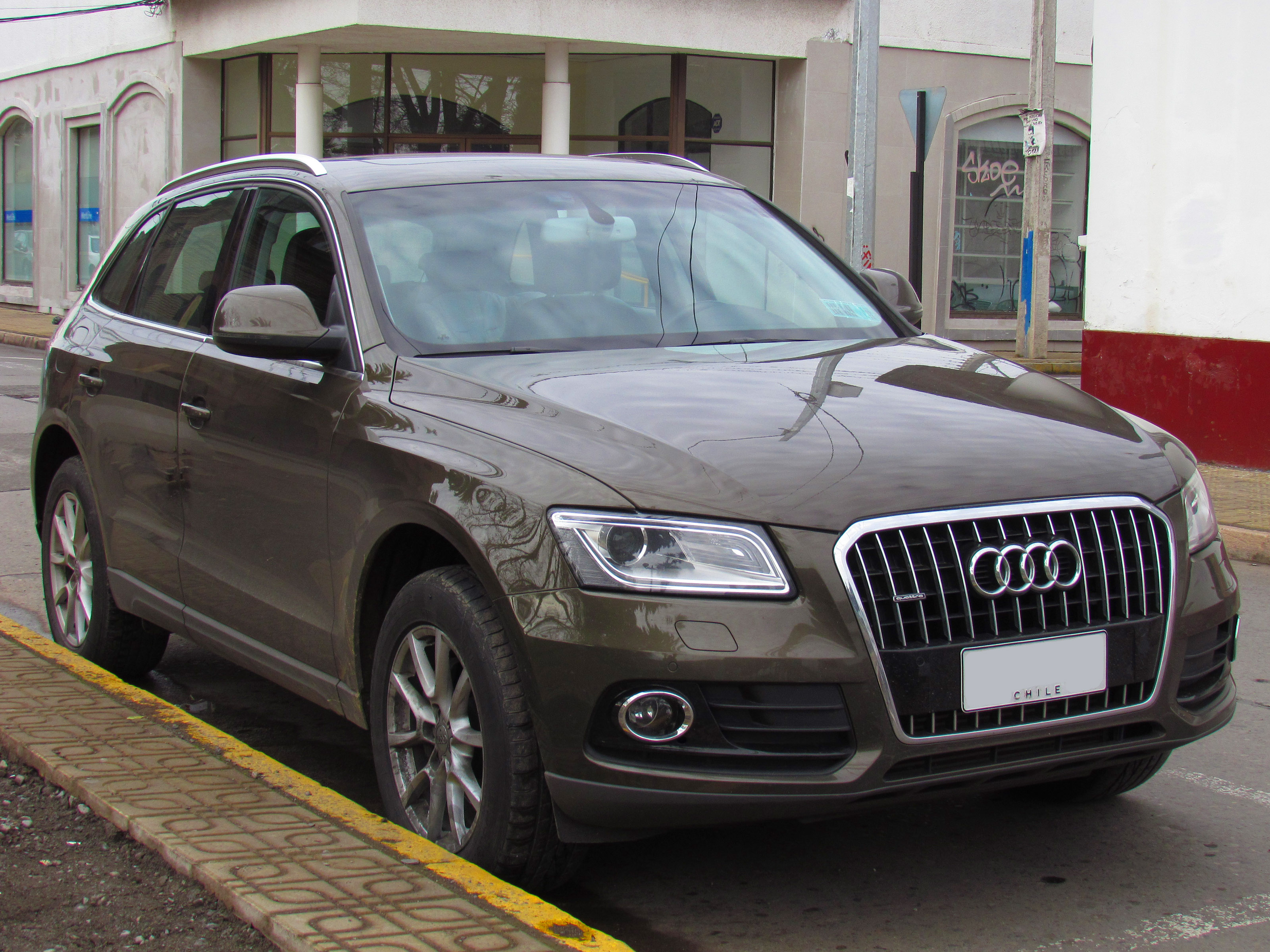 Audi Q5 2.0 TDi 2013